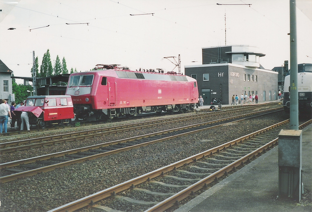 Eisenbahnfest zur 1200-Jahr-Feier der Stadt Herford, 17.-18.Juni 1989